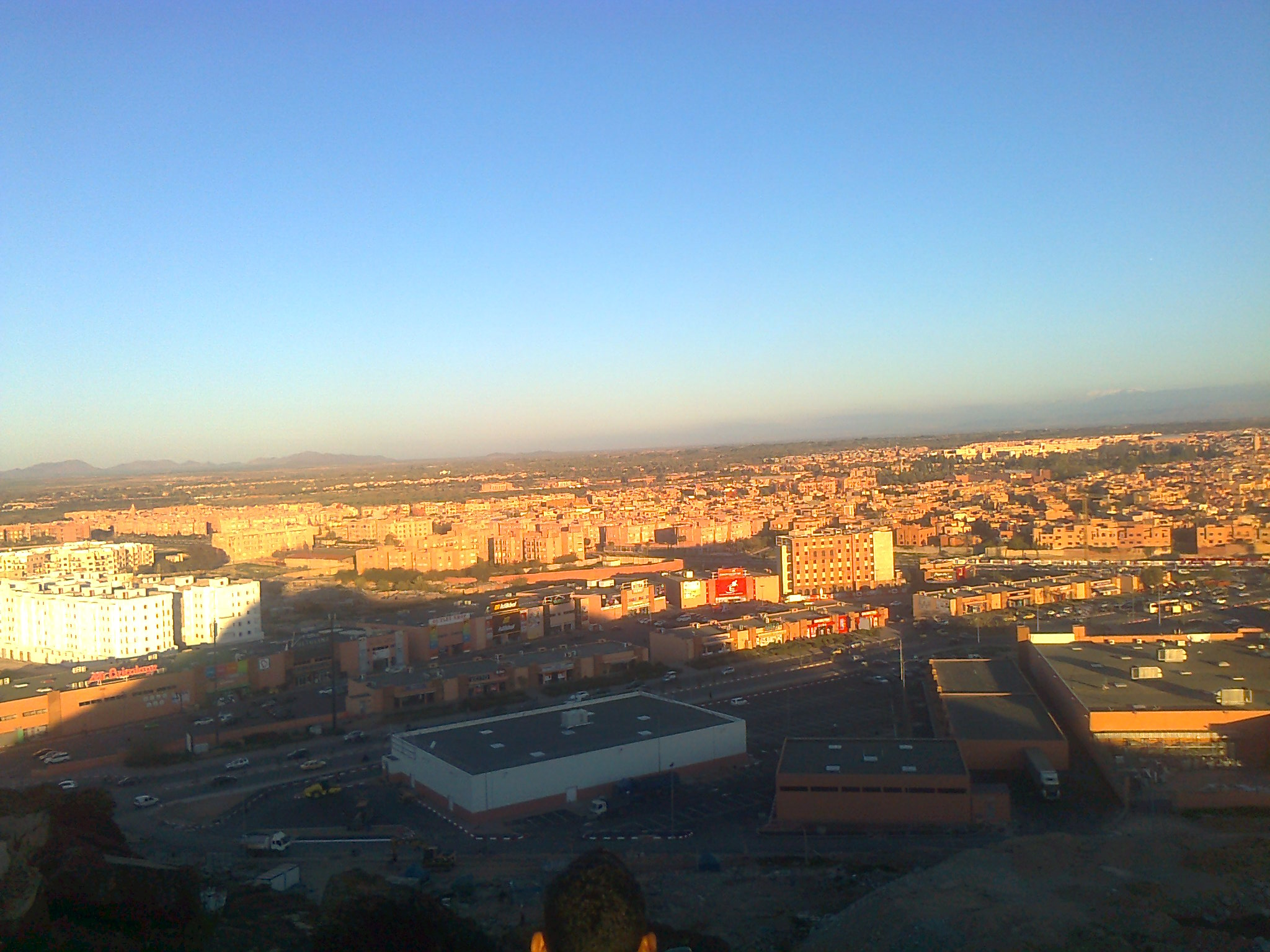 صورة لمدينة مراكش اتناء الغروب